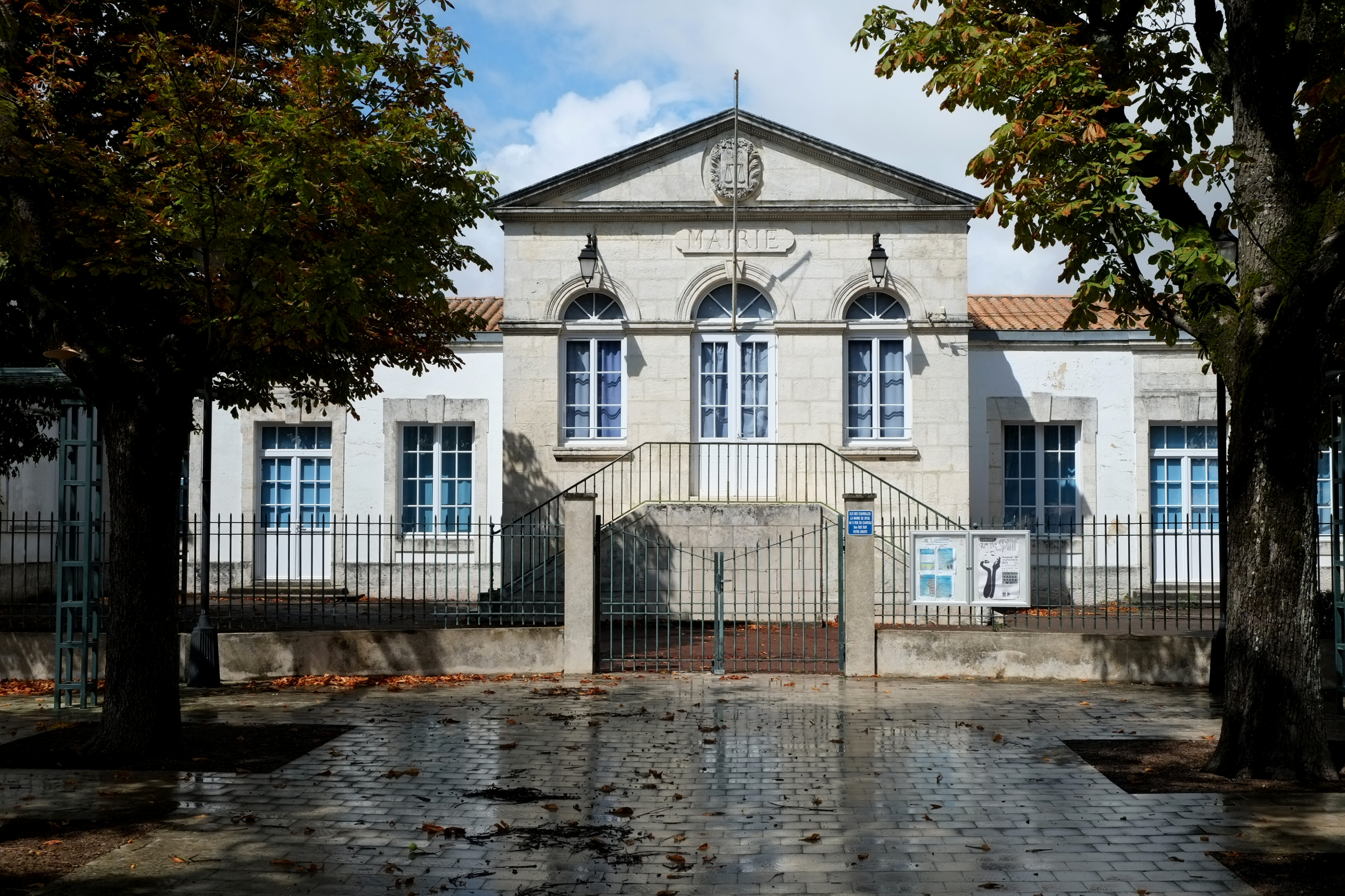 Ancienne mairie Périgny Charente-Maritime France